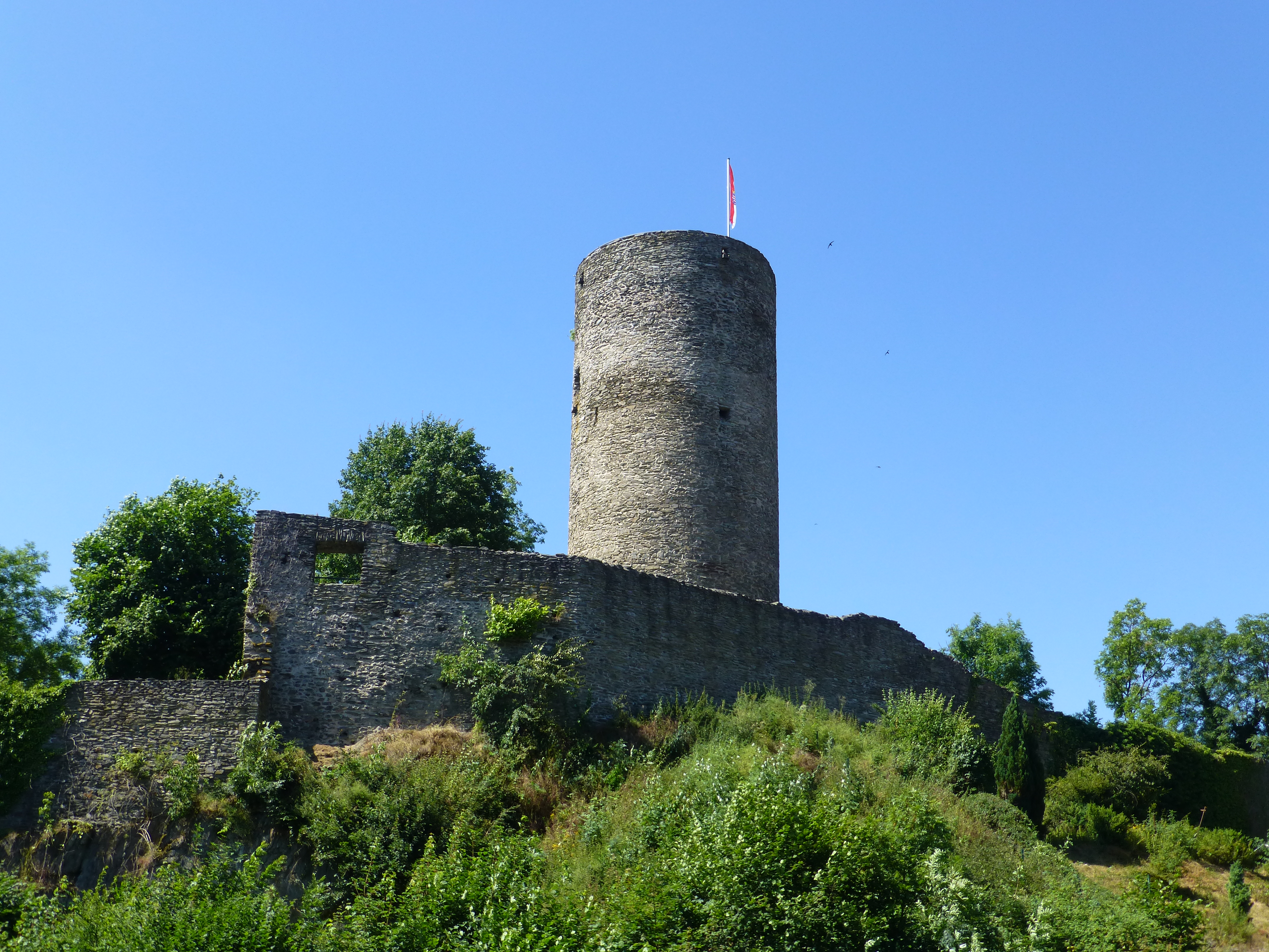 Burg Altweilnau; Blick von der Weilnauer Straße in südwestliche Richtung zur Burganlage